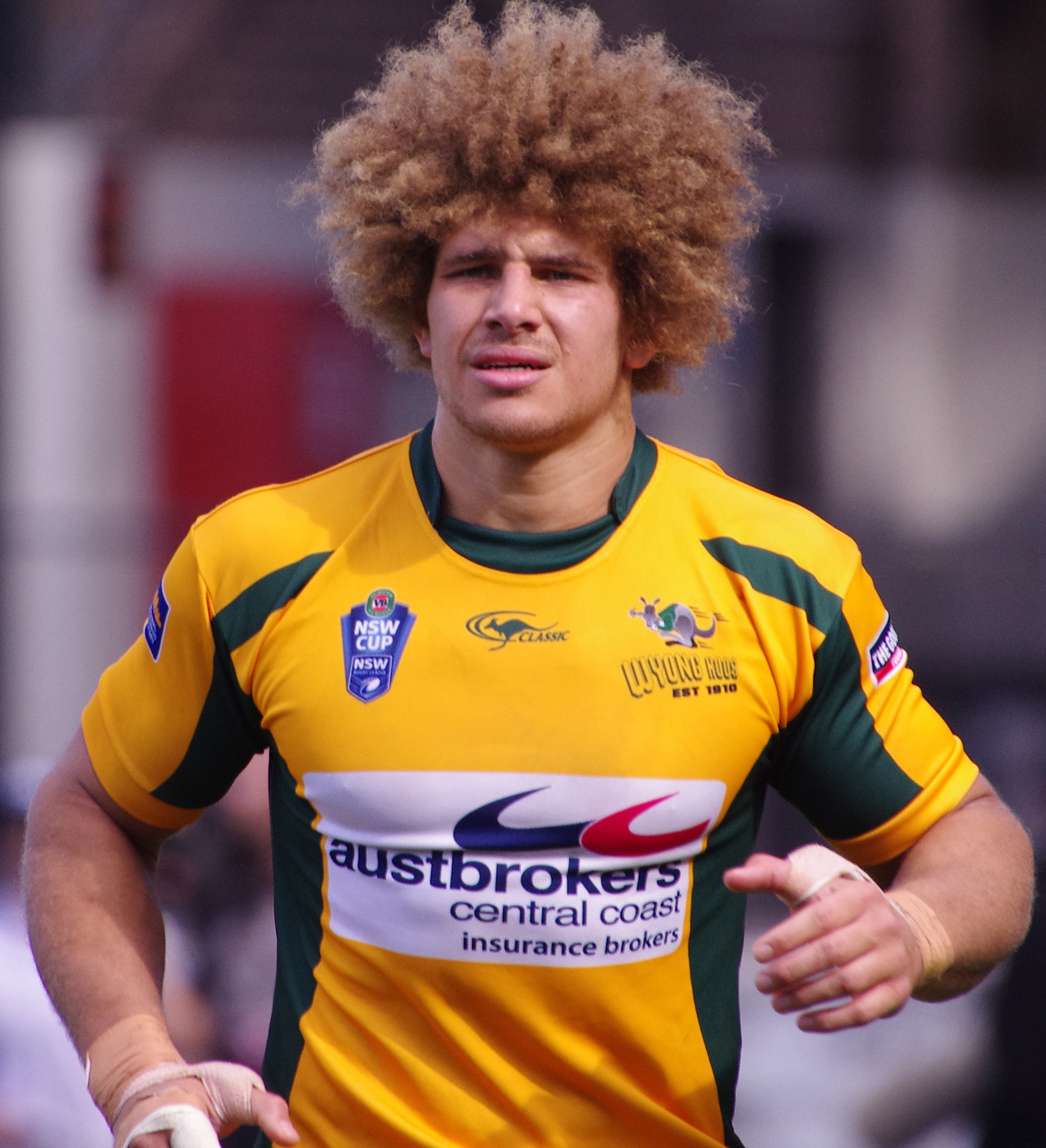 ELONI VUNAKECE